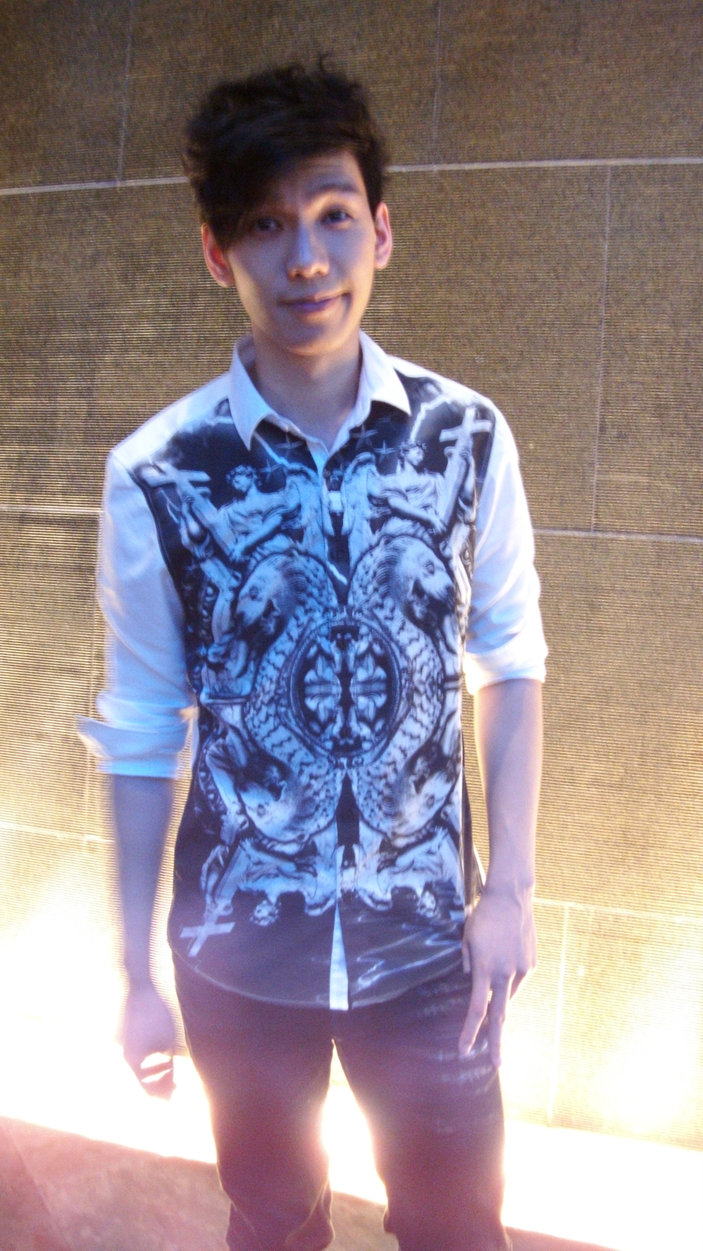 中文（香港）: 林奕匡的樣子